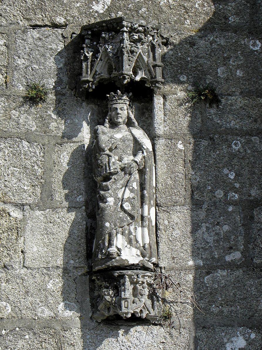 Église Notre-Dame de Trémaouézan (29).